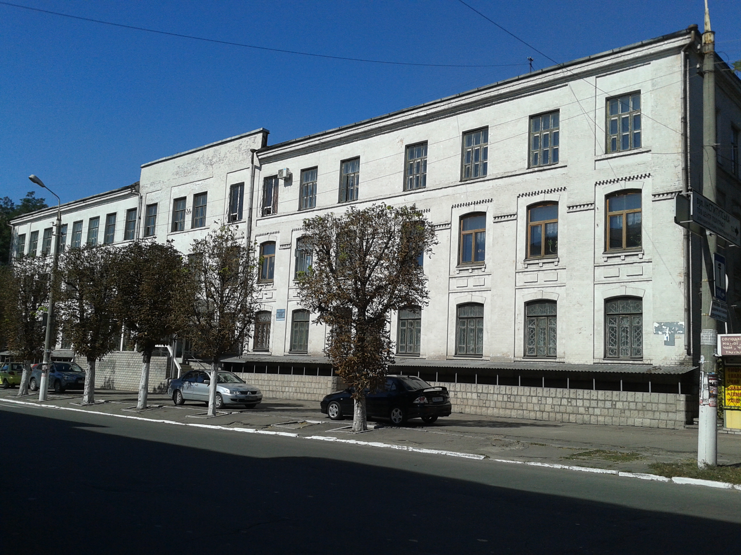 Дитячий притулок православного товариства (тепер — Корпус ДДТУ ім. Арсенічева) — інститут, в якому навчався Л. І. Брежнєв, Дніпродзержинськ, Заводський район, просп. Пеліна, 16